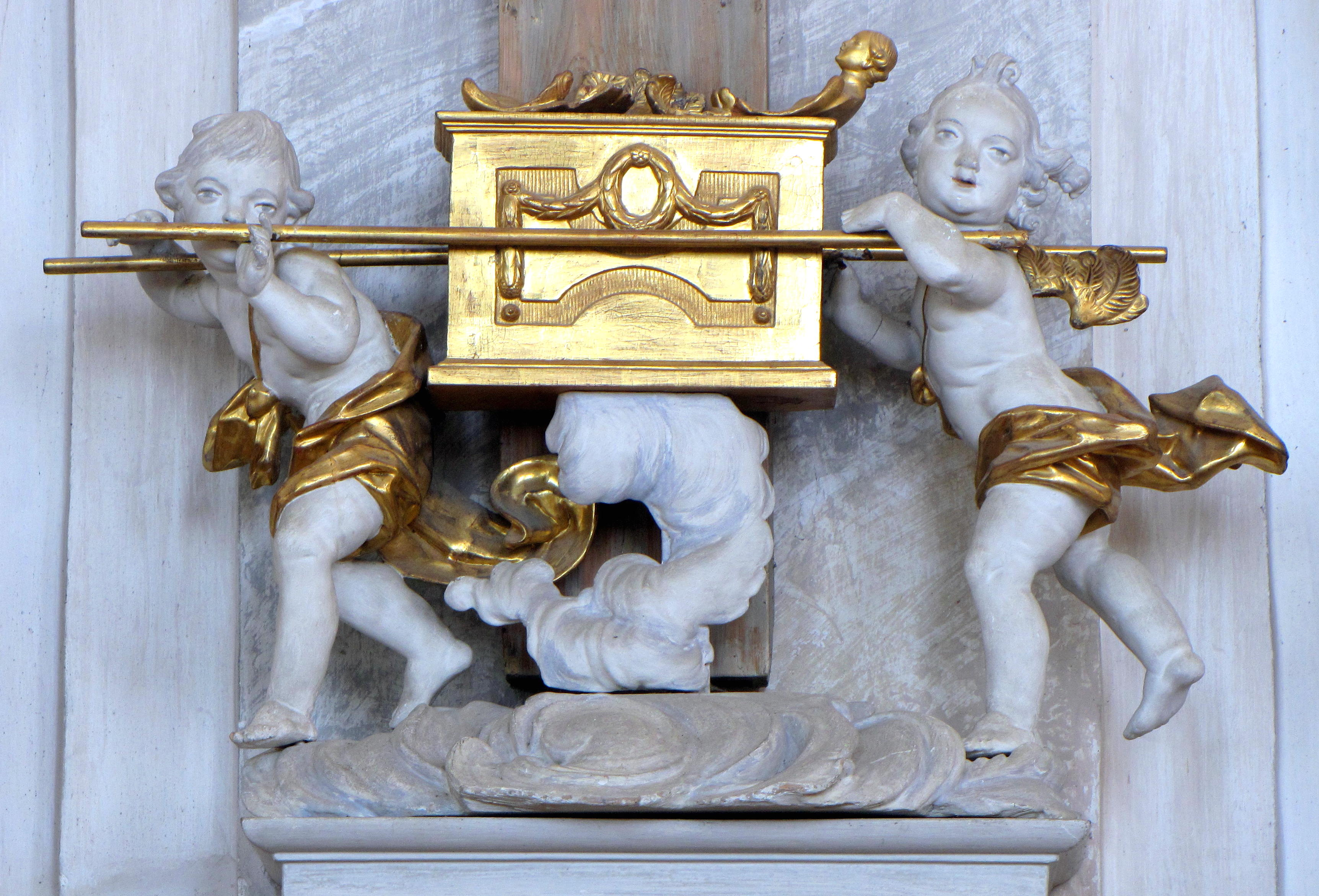 "Zwei Putten tragen die Bundeslade" in der Pfarrkirche von Denklingen